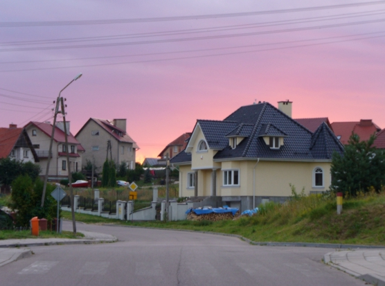 Wilkasy